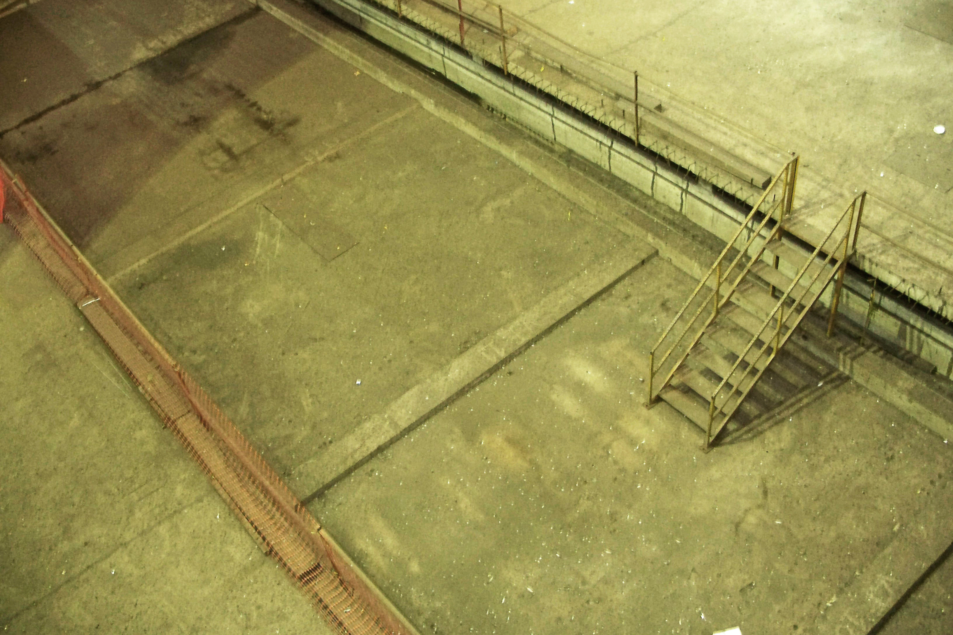 Leito de plataforma subterrânea na estação Pedro II, em São Paulo, Brasil, que nunca chegou a ser terminado. É possível vê-lo a partir do grande vão no meio do saguão da estação.